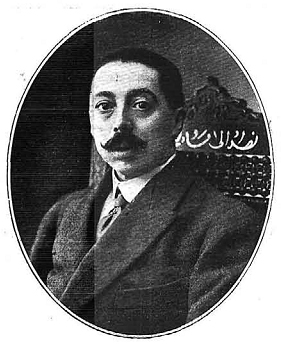 Retrato de Ricardo Catarineu, publicado en la revista española La Ilustración Española y Americana.